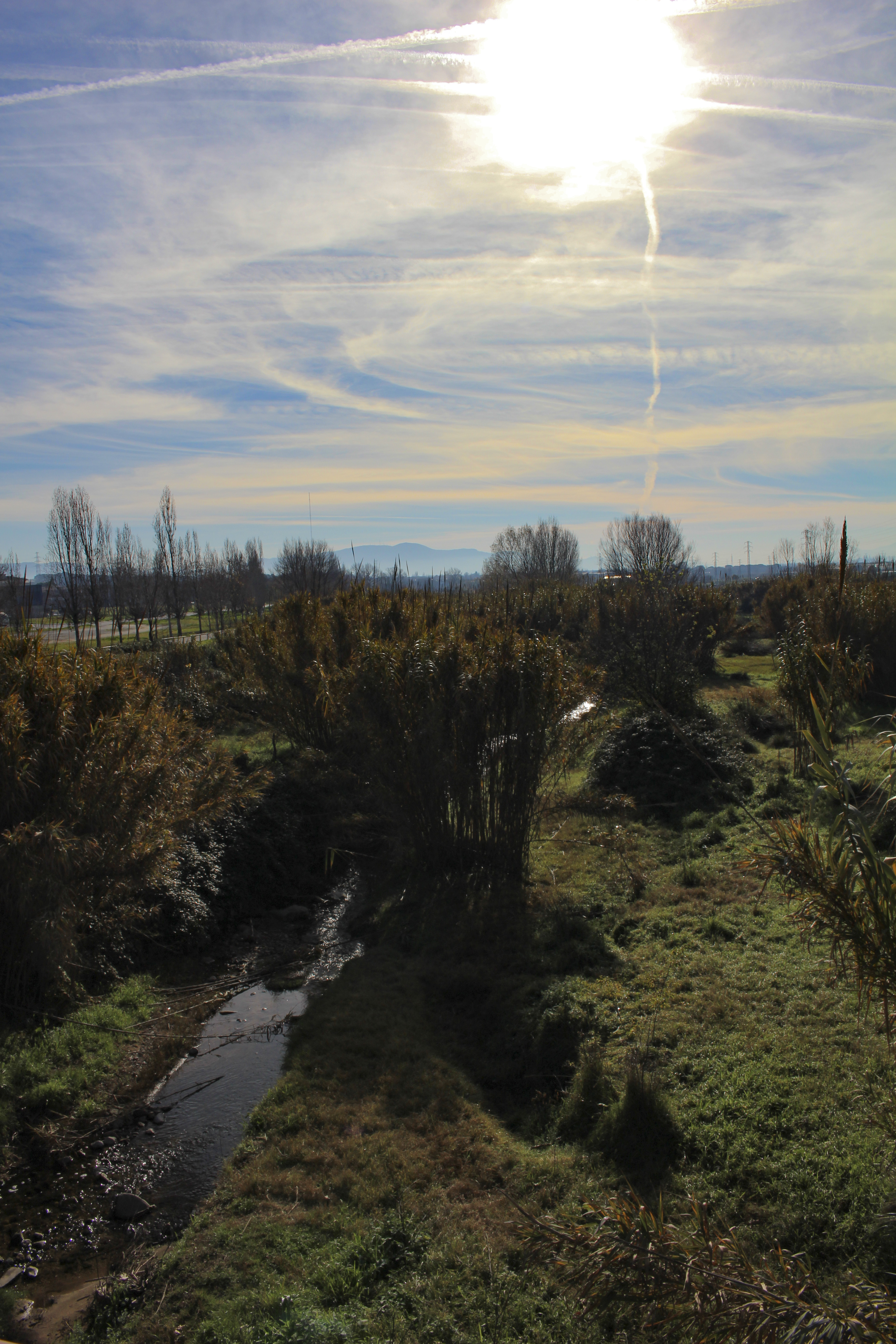 Riera de caldes durant l'any 2017